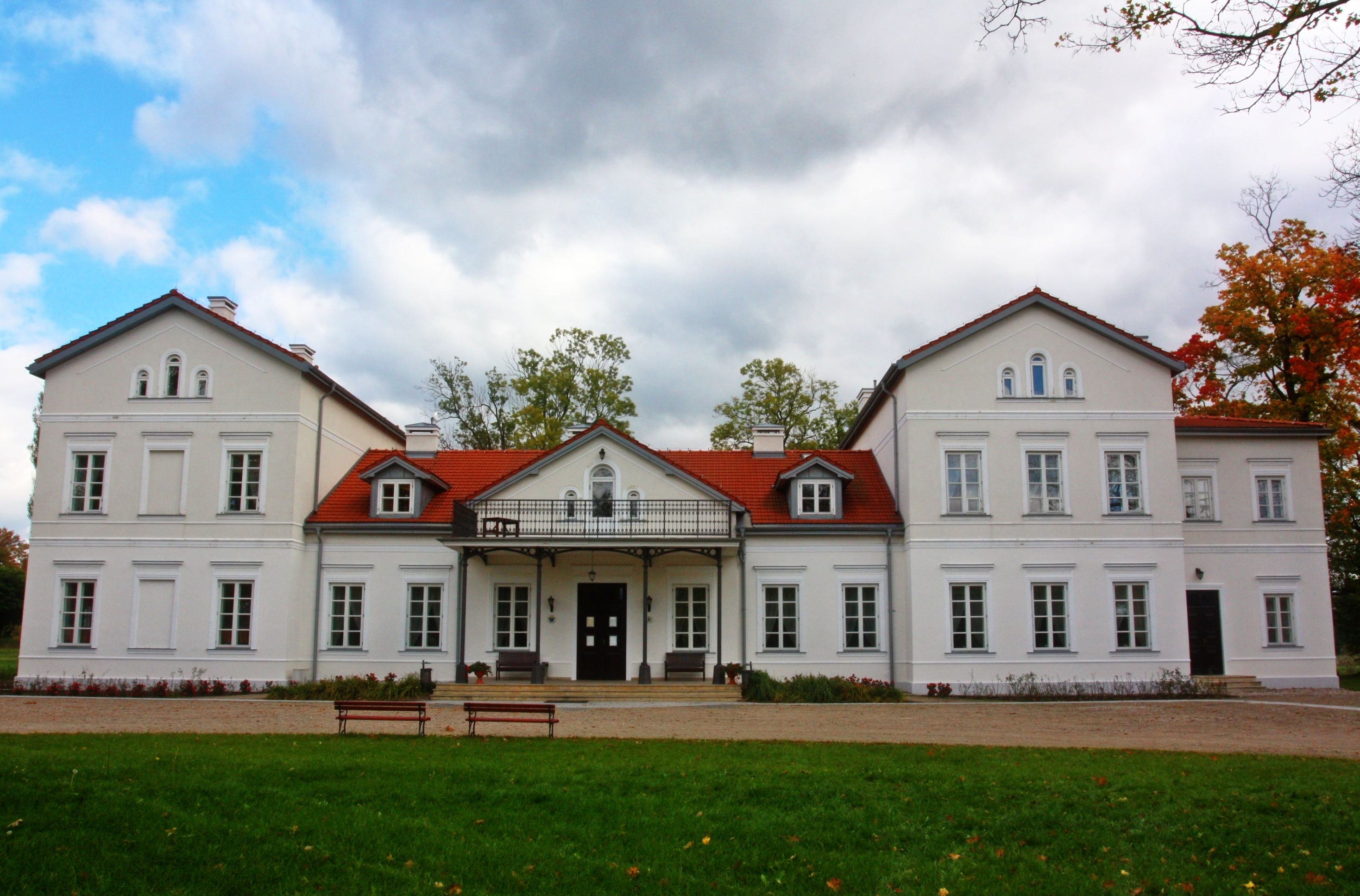 Łochów - dwór, 1 poł. XIX